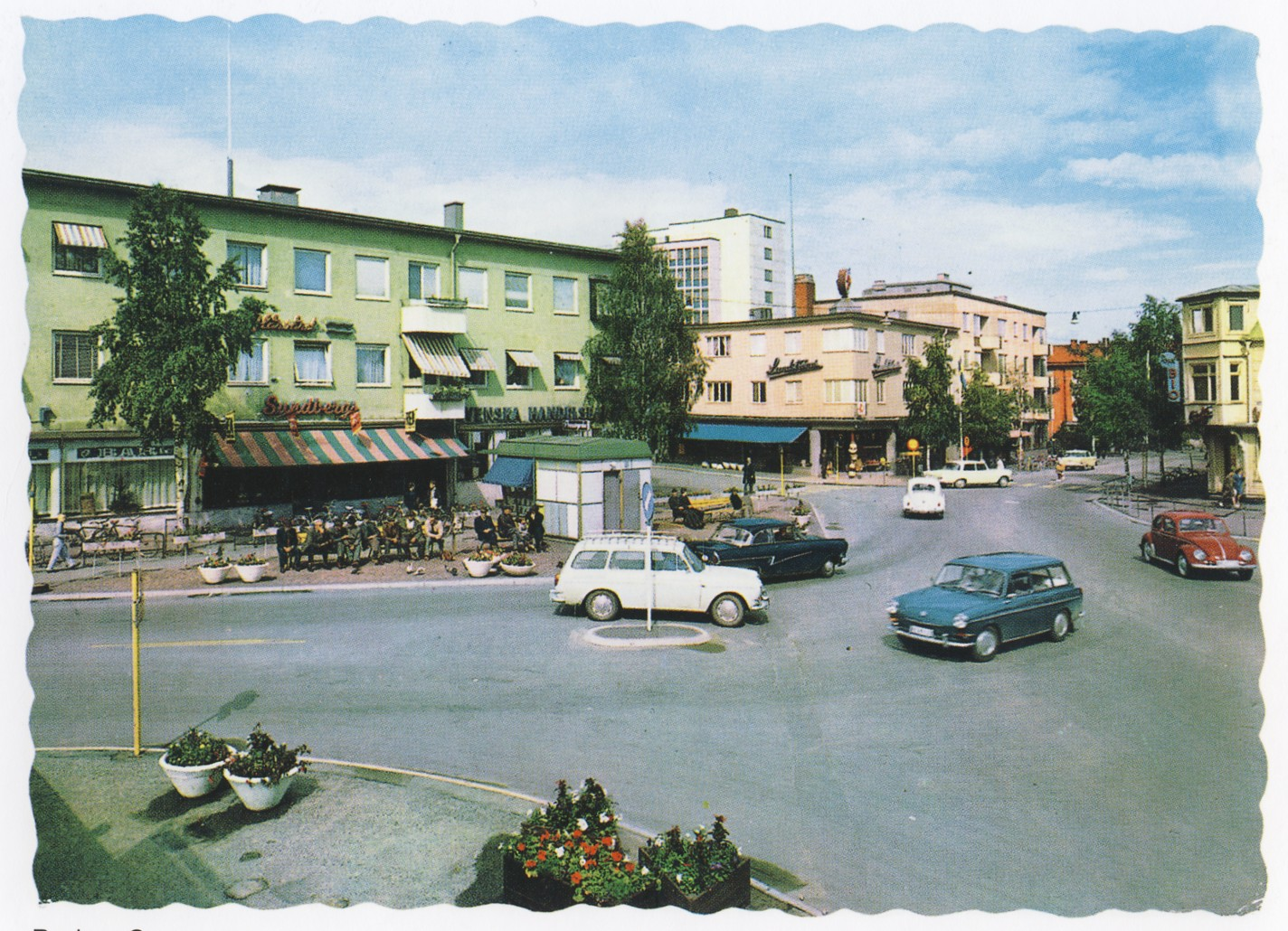 Boden centrum